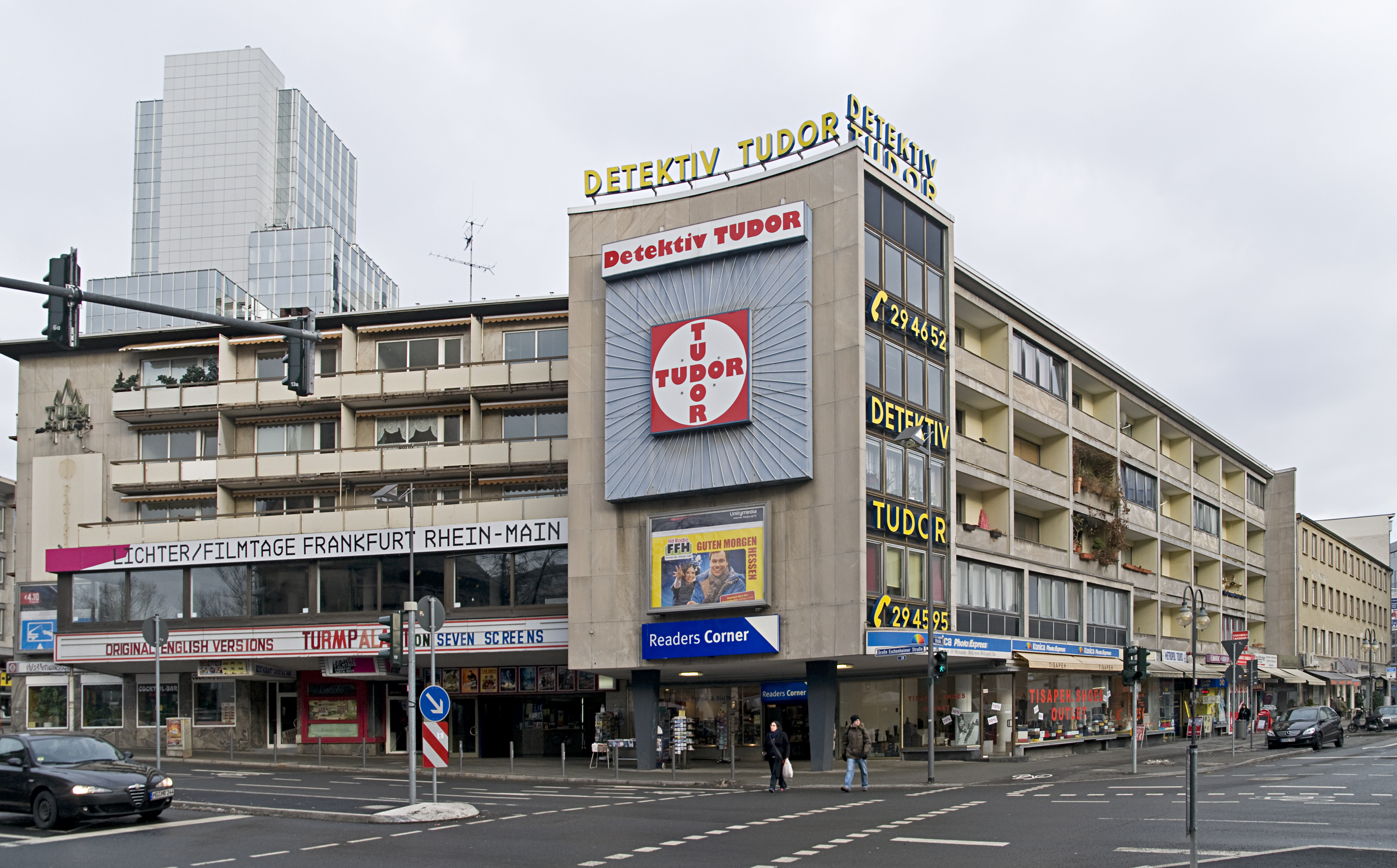 Turmpalast am Eschenheimer Tor in Frankfurt am Main